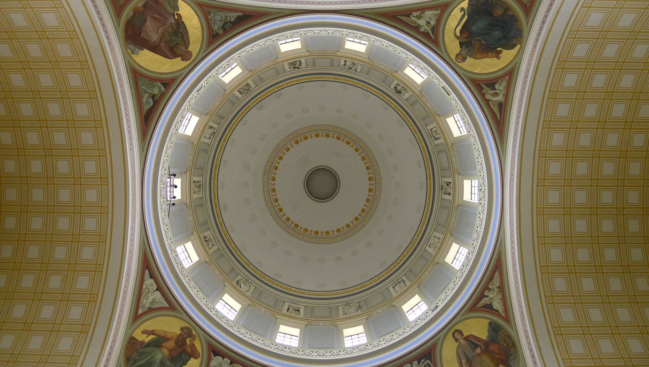 Die Tambourkuppel der St. Nicolaikirche in Potsdam